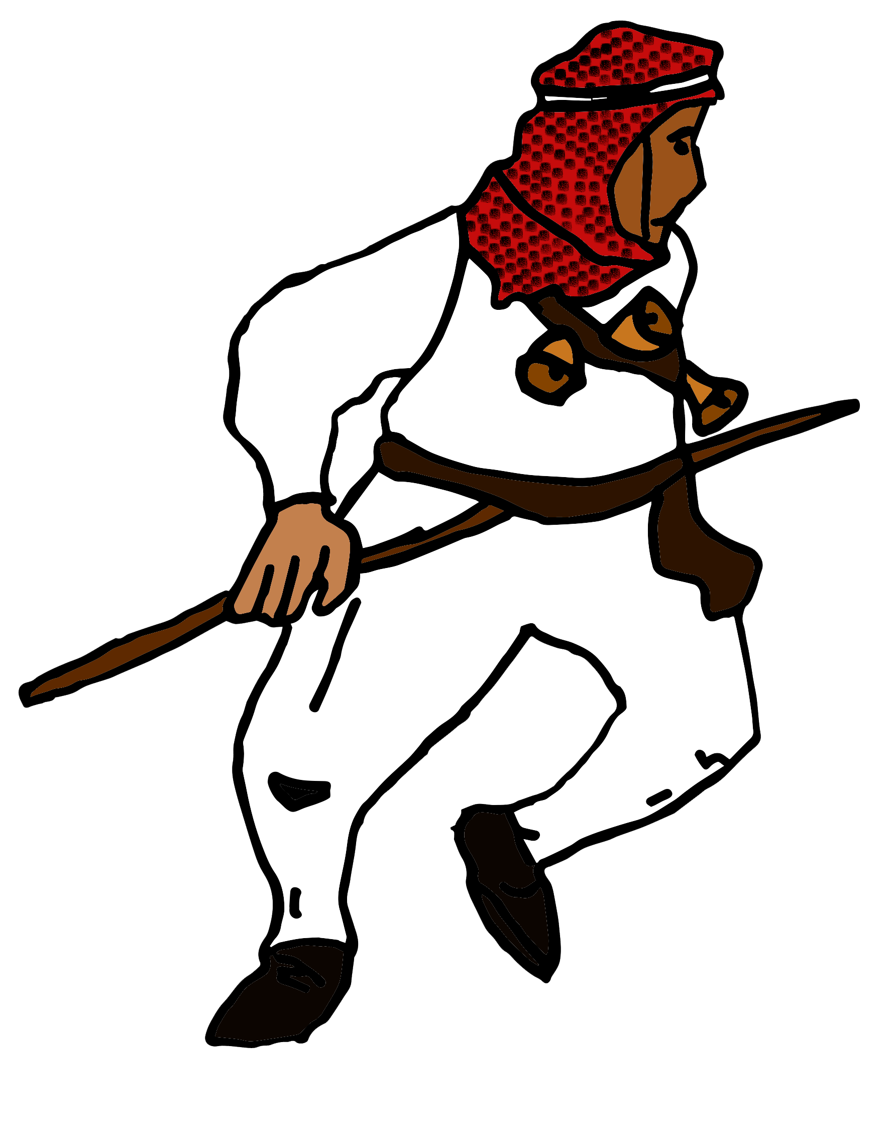 Unanuako mamuxarroa